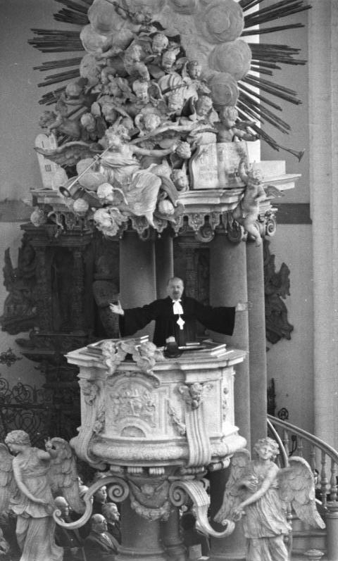 Zentralbild /Zehe 5.11.1959 Dibelius - Propagandaredner der Adenauer-CDU Dibelius hat die im demokratischen Berlin gelegene Marienkirche zu einer Stätte für Propagandareden der Adenauer-CDU herabgewürdigt. Für gläubige Menschen blieb dort beim Auftreten von Dibelius ohnehin immer weniger Platz, weil ein großer motorisierter Troß von kalten Kriegern, Abgesandten der Agentenorganisation mit Westberliner und alliierten Autonummern die Kirchenbänke bevölkerte. UBz: Dibelius in der Marienkirche am 1.11.1959.